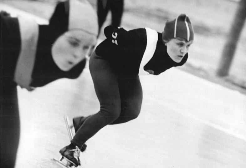 Zentralbild Kohls 16.3.1963 Deutsche Meisterschaften im Eisschnellauf..am 16. und 17.3.1963 auf der neuerbauten 400-m-Kunsteisbahn im Dynamo-Sportforum in Berlin mit Gästen aus Rumänien und Österreich. UBz: Helga Haase (SC Dynamo Berlin) gewann am 16.3.1963 bereits die Läufe über 500 m und 1 500 m (Hier im Zweikampf mit Gisela Manns über 1500 m) -links